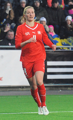 a_45_0821